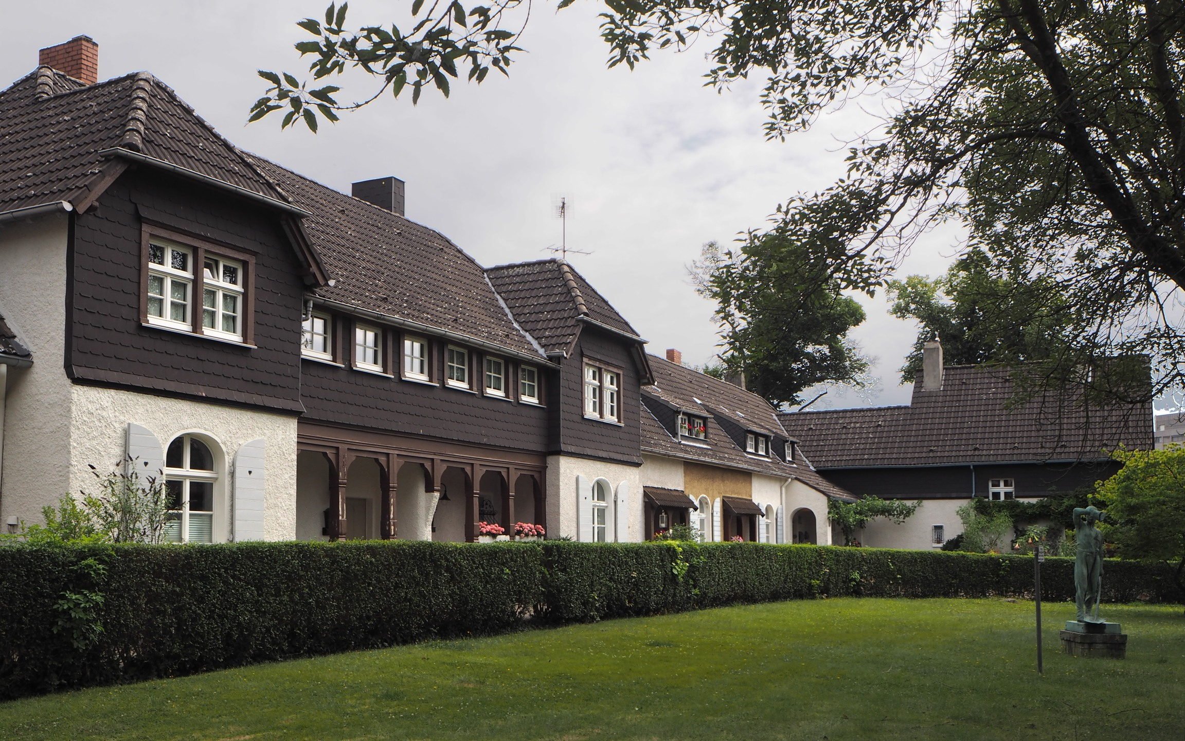 Essen, Krupp-Siedlung Altenhof 1, Haus am Gußmannplatz